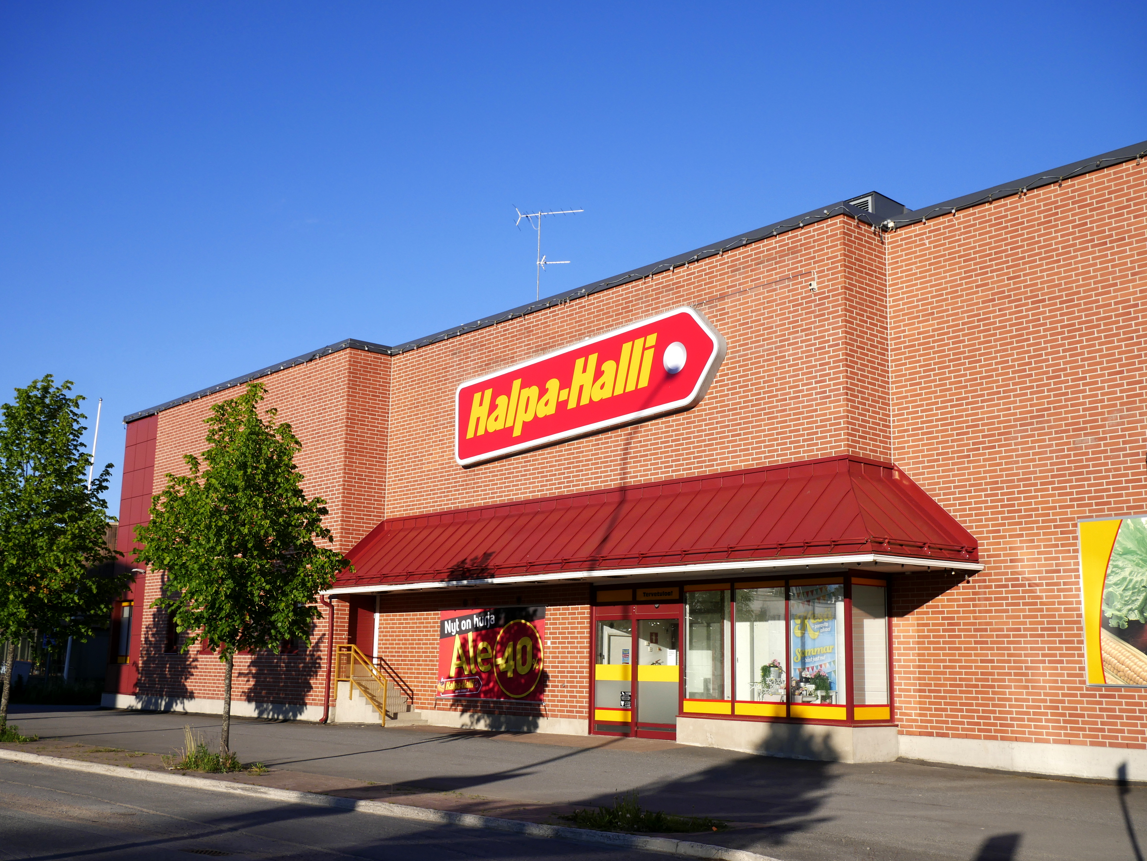 Kauhavan Halpa-Halli myymälä.